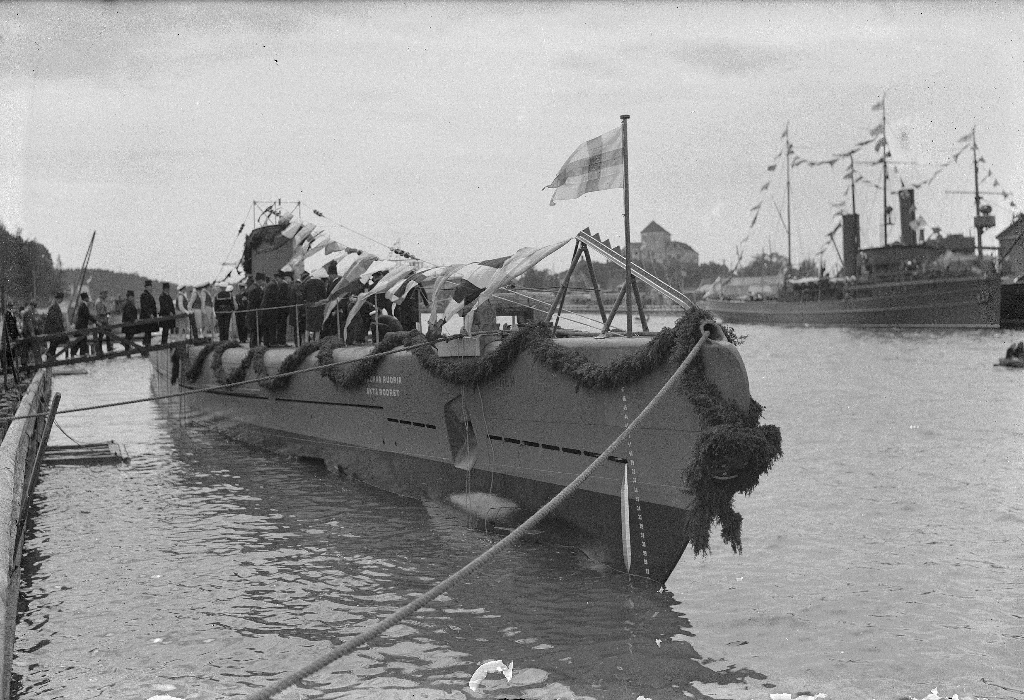 sukellusvene Vetehisen vesillelasku Turussa Crichton-Vulcanin telakalla 1.6.1930; pysty, mustavalkoinen